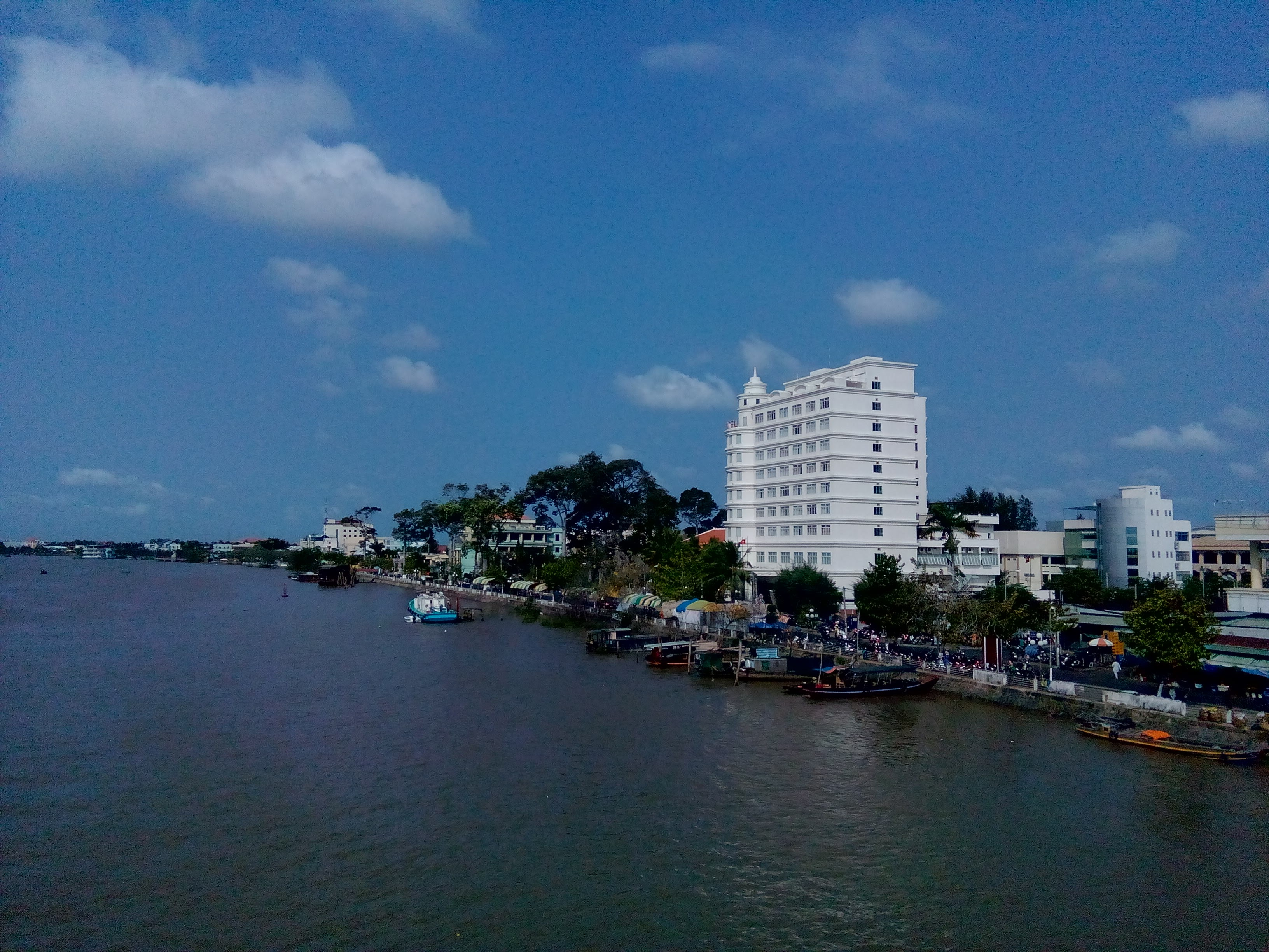 Ben Tre City from the river side